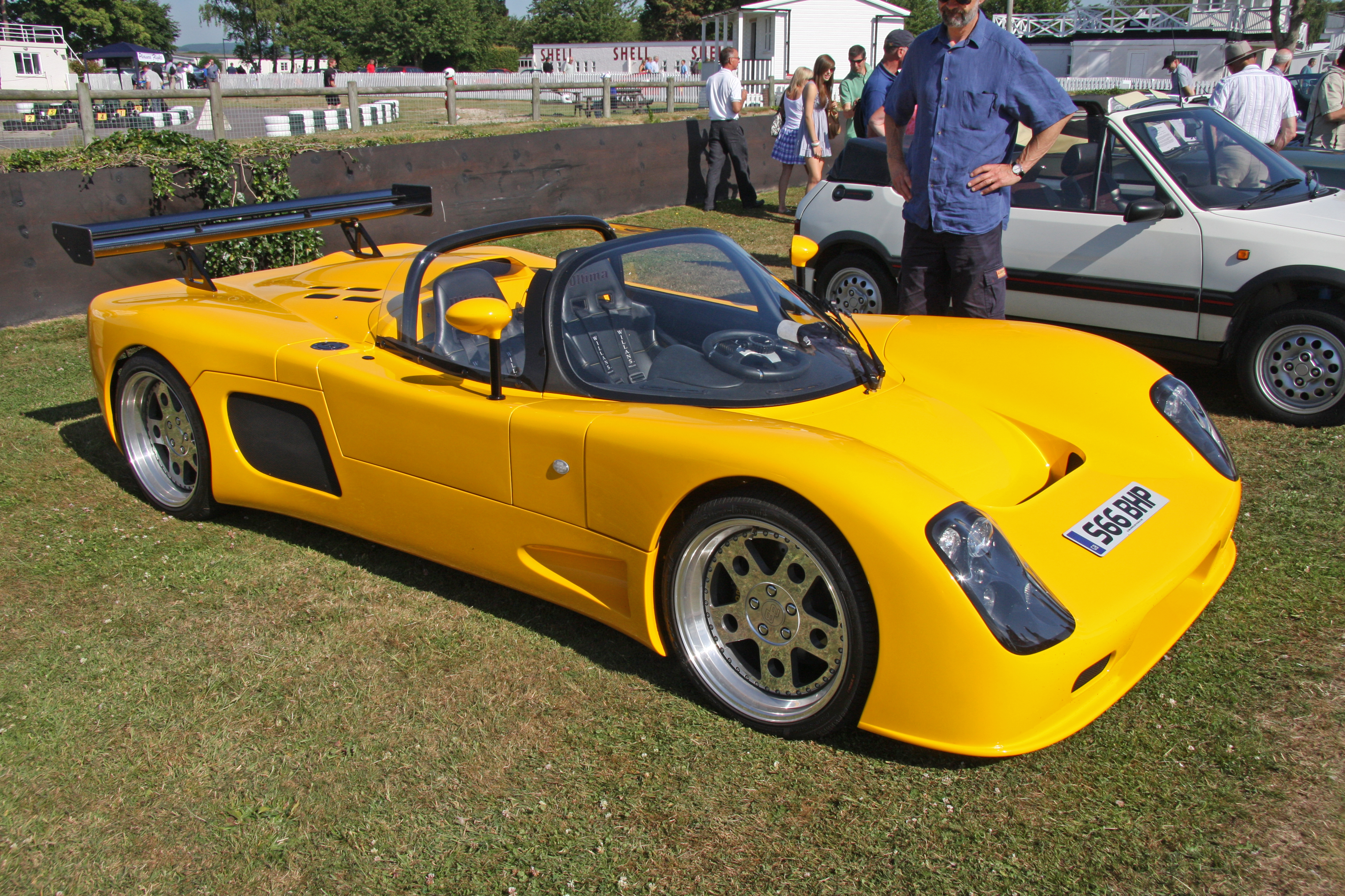 Ultima